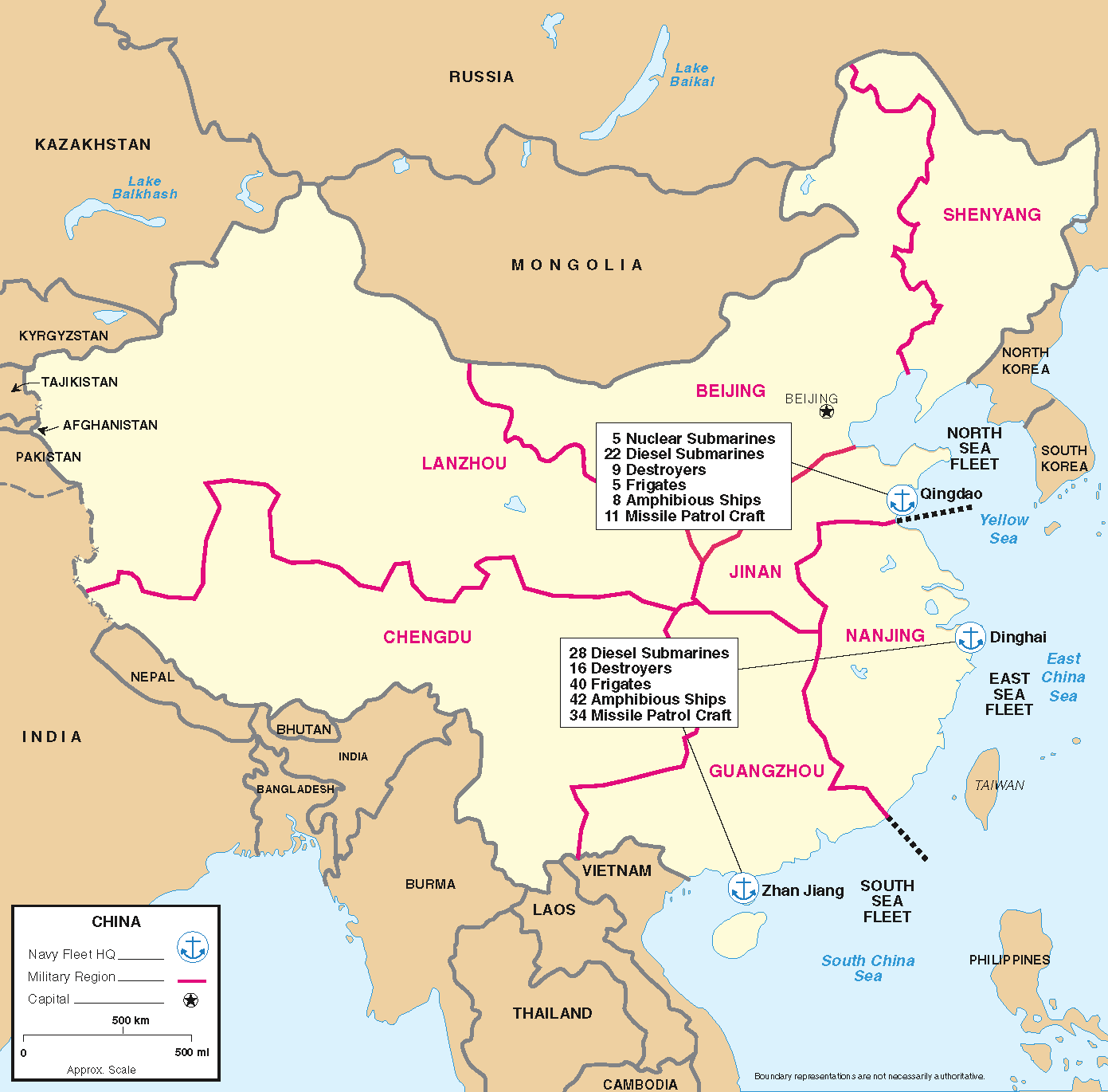 Figure 14. Major Naval Units